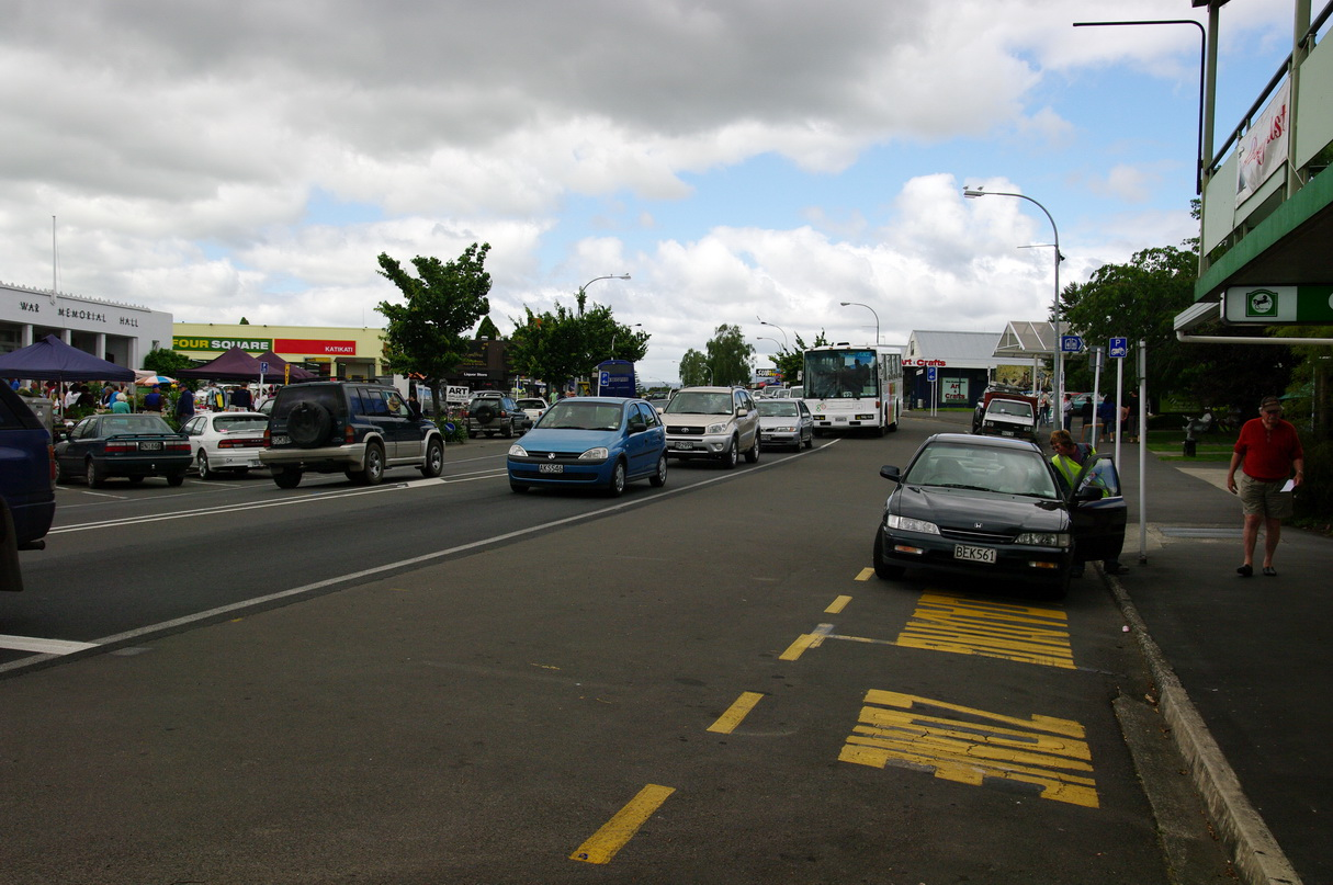 Hauptstraße von Katikati, Neuseeland